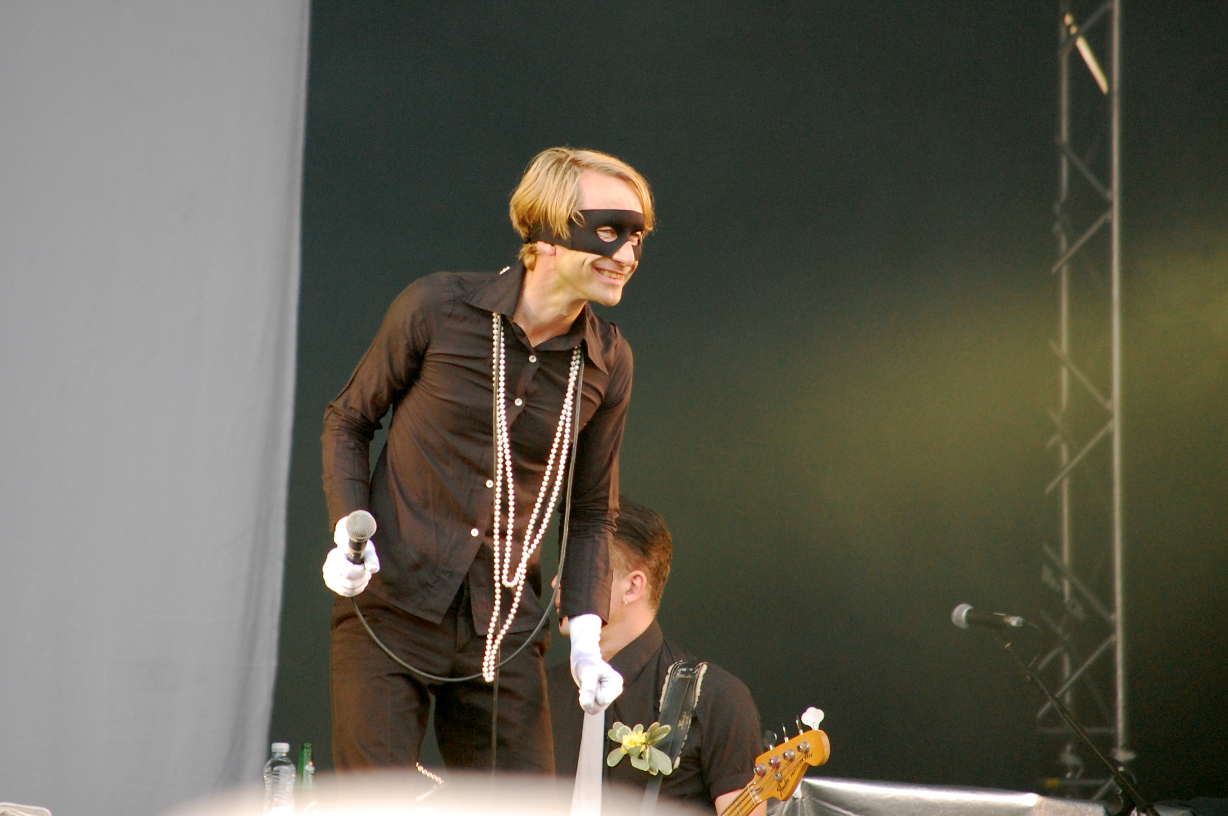 bob hund live at arvikafestivalen 2009